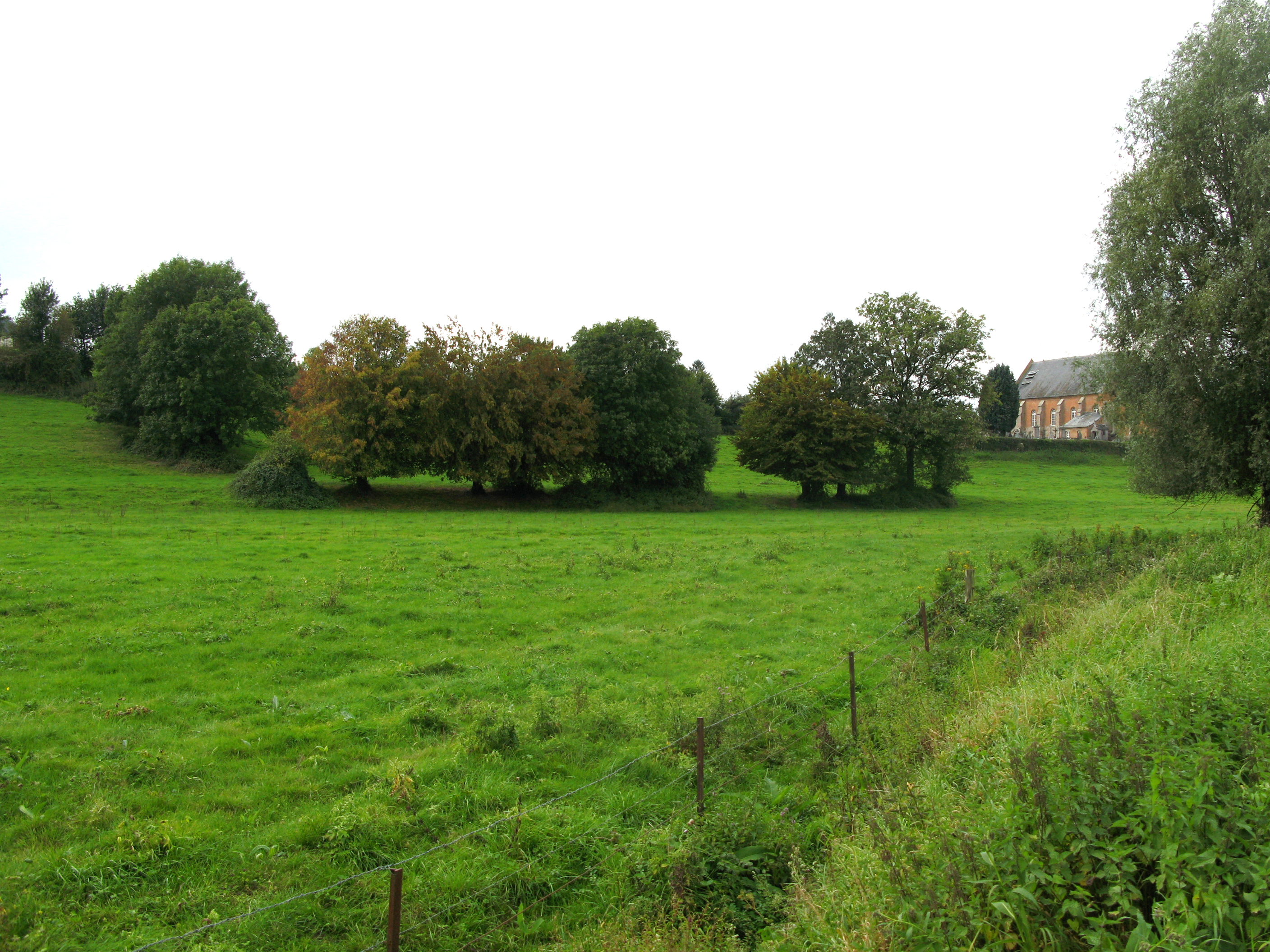 Marly-Gomont (Aisne, France) - L'église fortifiée apparaissant derrière les haies.